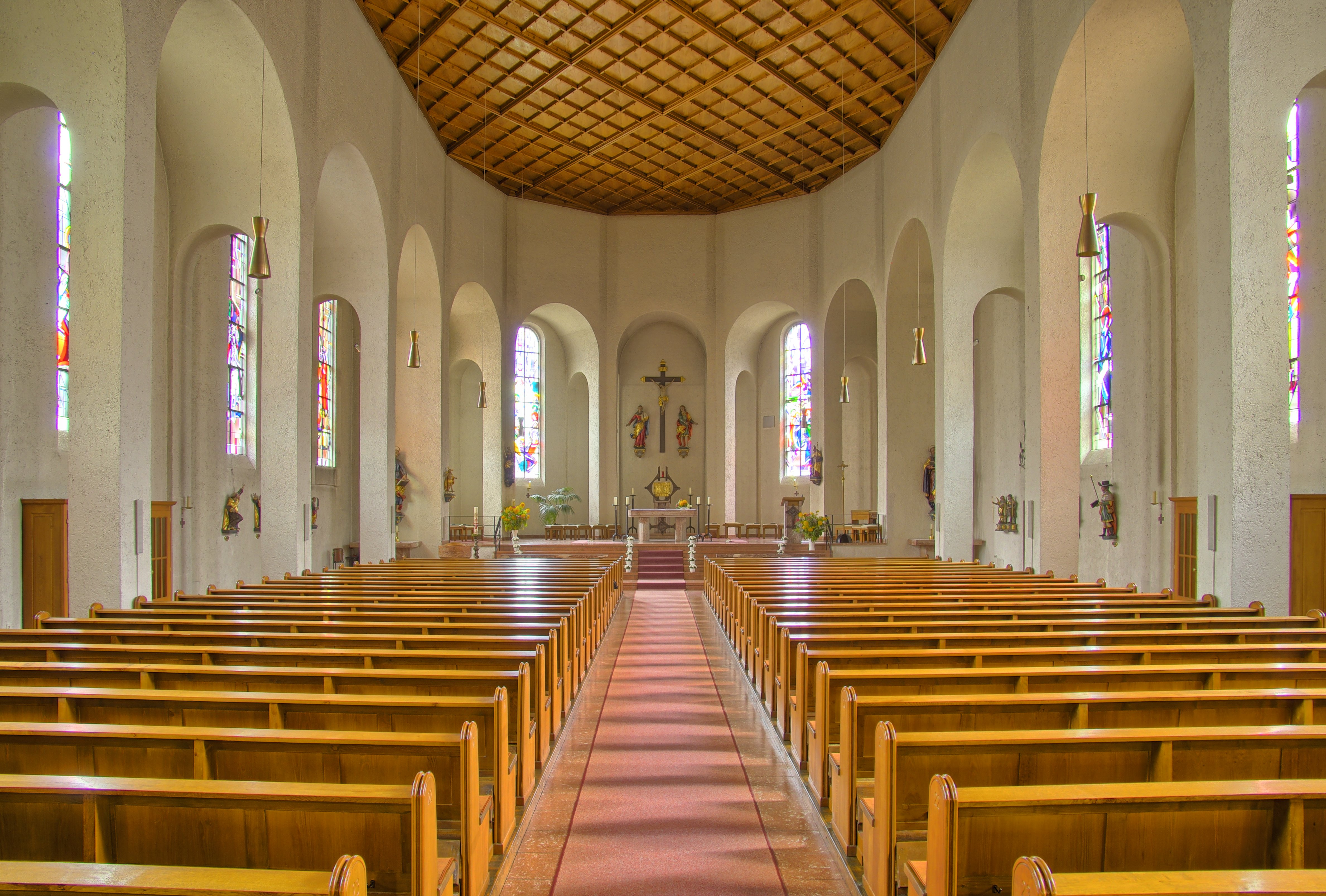 Die Pfarrkirche St. Martin in Vöhrenbach